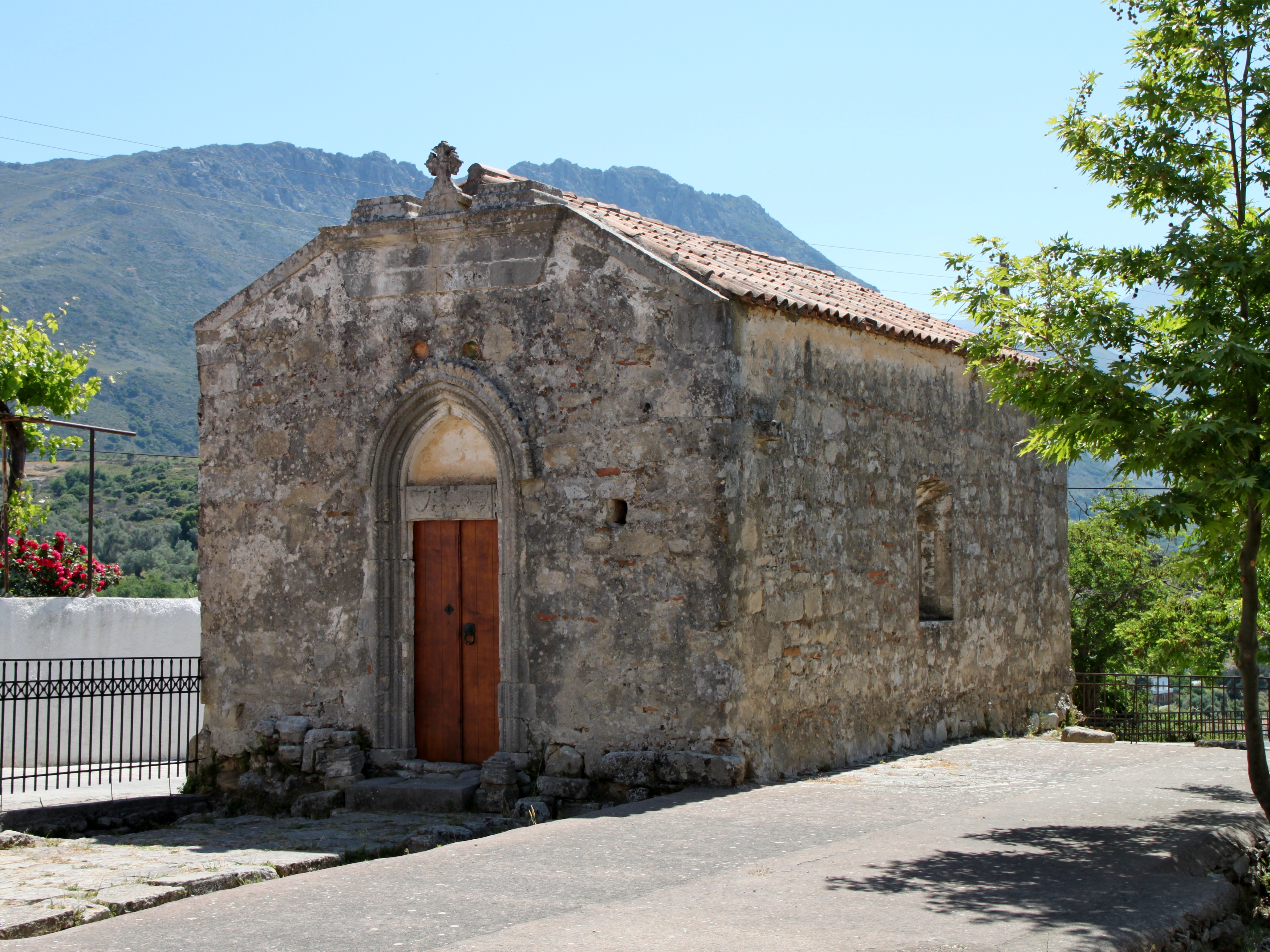 Marienkirche (Ναός Παναγίας) von Thronos, Gemeinde Amari, Kreta, Griechenland